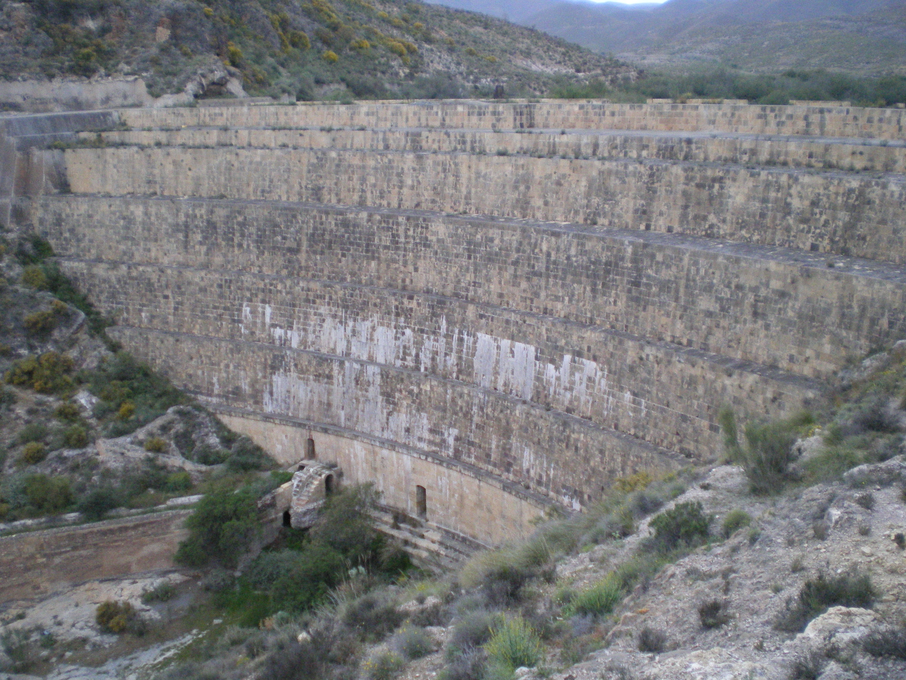 Fotografía de la presa del Embalse de Isabel II en Níjar, Almería, España, vista desde el sureste.